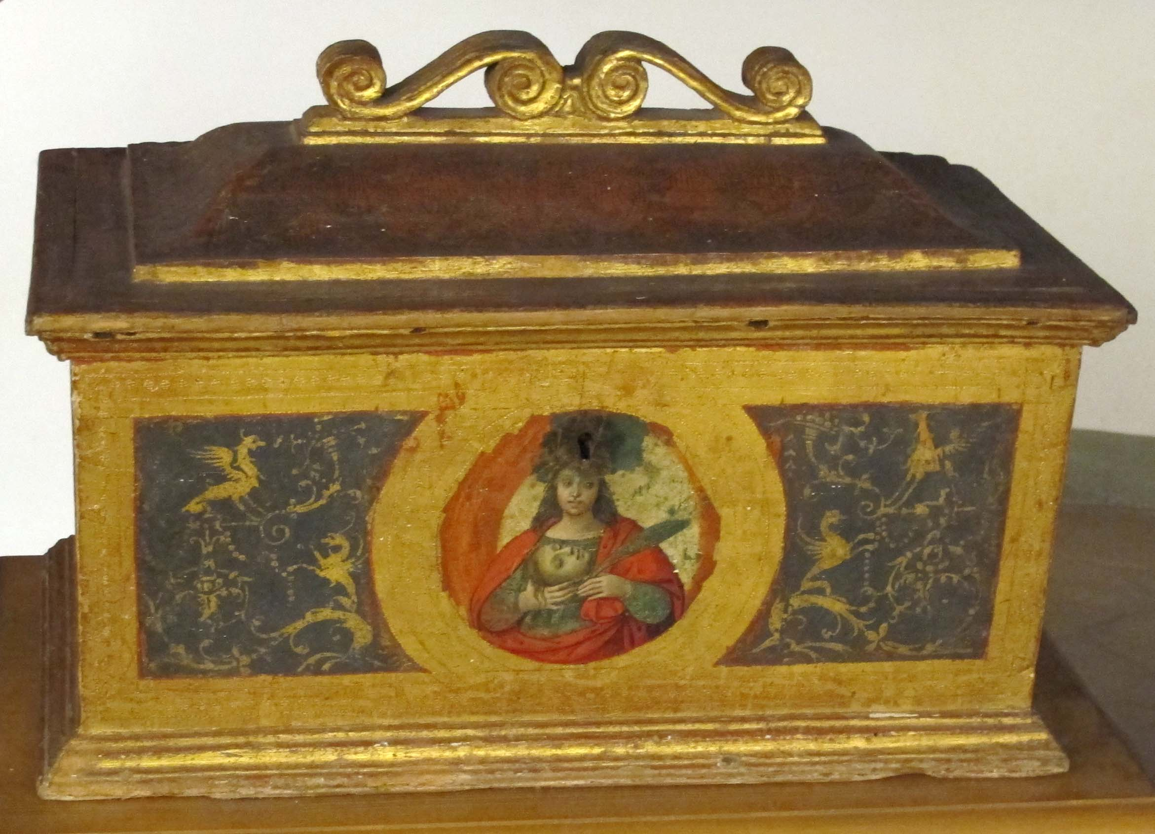 Museo diocesano (Siena)